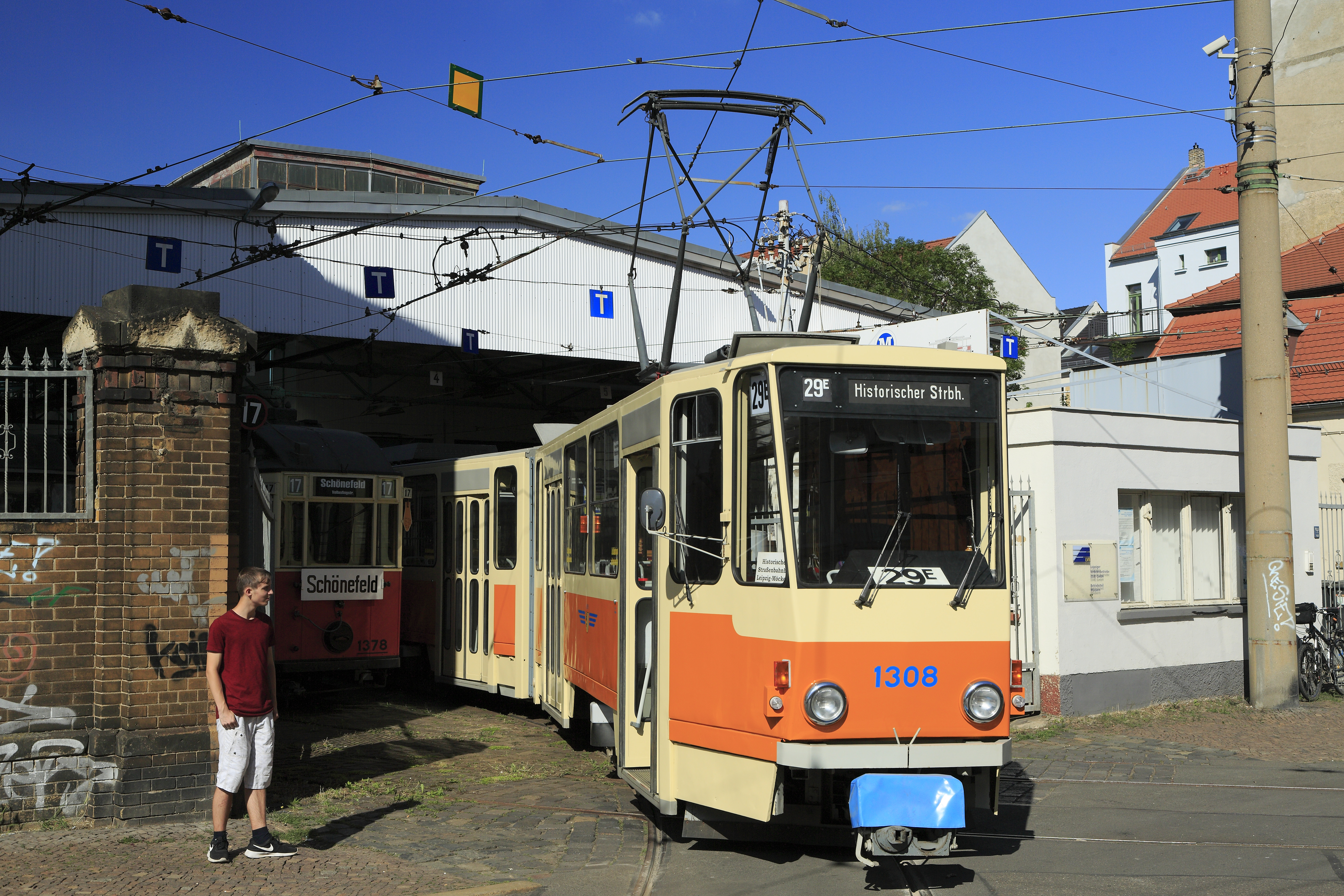 Kurzgelenkwagen KT4D, Typ 34. Nur acht Nullserienwagen kamen 1975 nach Leipzig. Eingesetzt wurden sie in der Regel als Doppeleinheiten auf der Linie 2, einzelnfahrend auf der 33 und als modernste Fahrzeuge der Stadt während der Messen auf den Messesonderlinien. Die LVB experimentierten beim Typ 34 mit mehreren Anstrichsvarianten. Die Wagen 1301 und 1302 erhielten den klassischen Straßenbahnanstrich in elfenbein mit blauem Zierstreifen, die Wagen 1303 und 1304 elfenbein mit breiter blauer Bauchbinde und die Wagen 1308 bis 1308 wie hier im Bild elfenbein mit orange und blauen Anschriften. Zur Typenvereinigung wurden die Wagen 1984 nach Berlin abgegeben. Zurückgeholt wurde der Wagen 1308 erst nach 2000, nachdem er von den Berliner Verkehrsbetrieben ausgemustet worden war. Nach mehreren Jahren Abstellzeit wegen Unwilligkeit der LVB wurde er im Zustand ab 1976 mit Fahrkartendruckentwertern betriebsfähig aufgearbeitet.Links angeschnitten der Triebwagen 1378, Typ 24a.